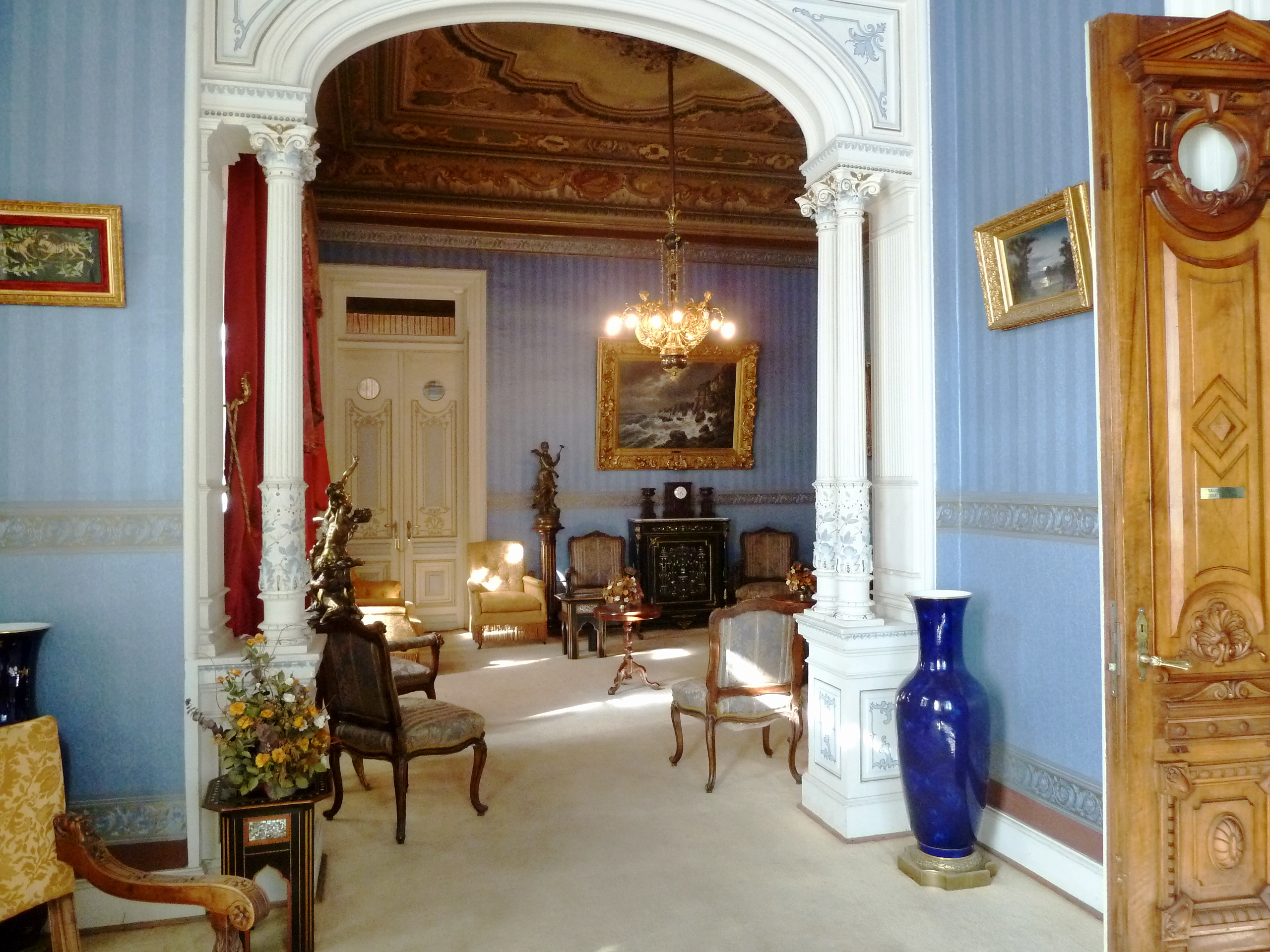 Palacio de la familia Brown construido entre 1895 y 1905, Punta Arenas - Chile